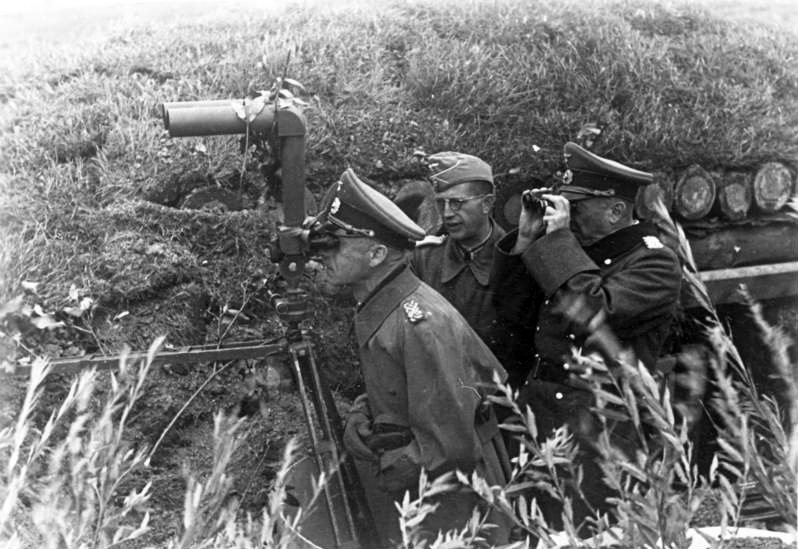 An der Sowjetfront. Der Oberbefehlshaber der Heeresgruppe Nord, Generalfeldmarschall Ritter von Leeb und der Oberbefehlshaber der 18. Armee, Generaloberst von Küchler auf einer vorgeschobenen Beobachtungsstelle der Artillerie. (bei Krasnoje Selo) PK-Aufnahme: Kriegsberichter: Schröter 9219-41 "Fr.f.D." "Fr.OKW" Sept. 41